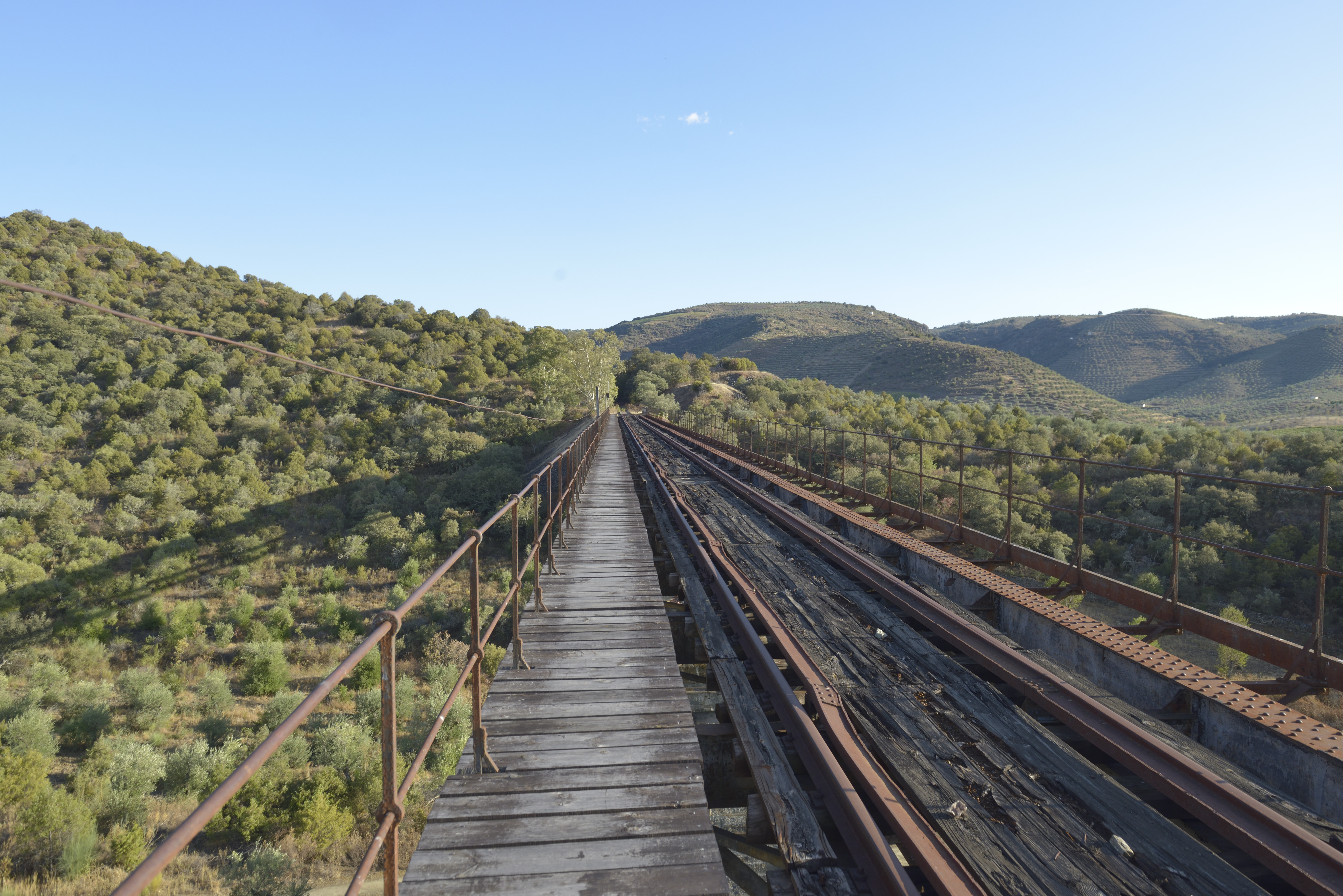 Ponte das Almas (ponte nº11) da Linha Internacional de Pocinho a La Fuente de San Esteban.